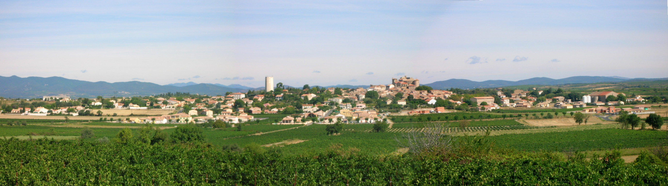 Puissalicon - le village en panoramique